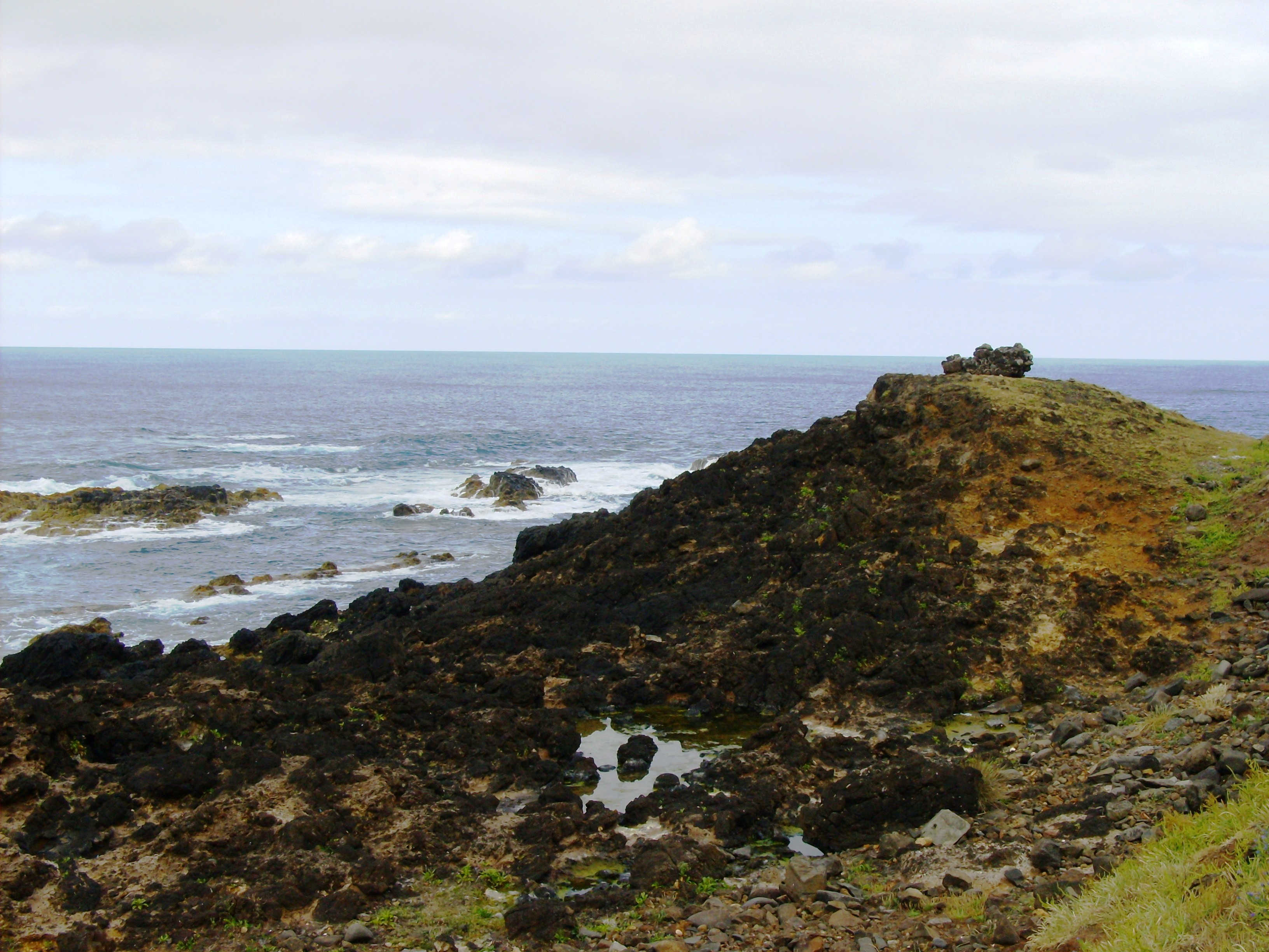 Forte da Maia (ruínas), Ilha de Santa Maria (Açores), Portugal.